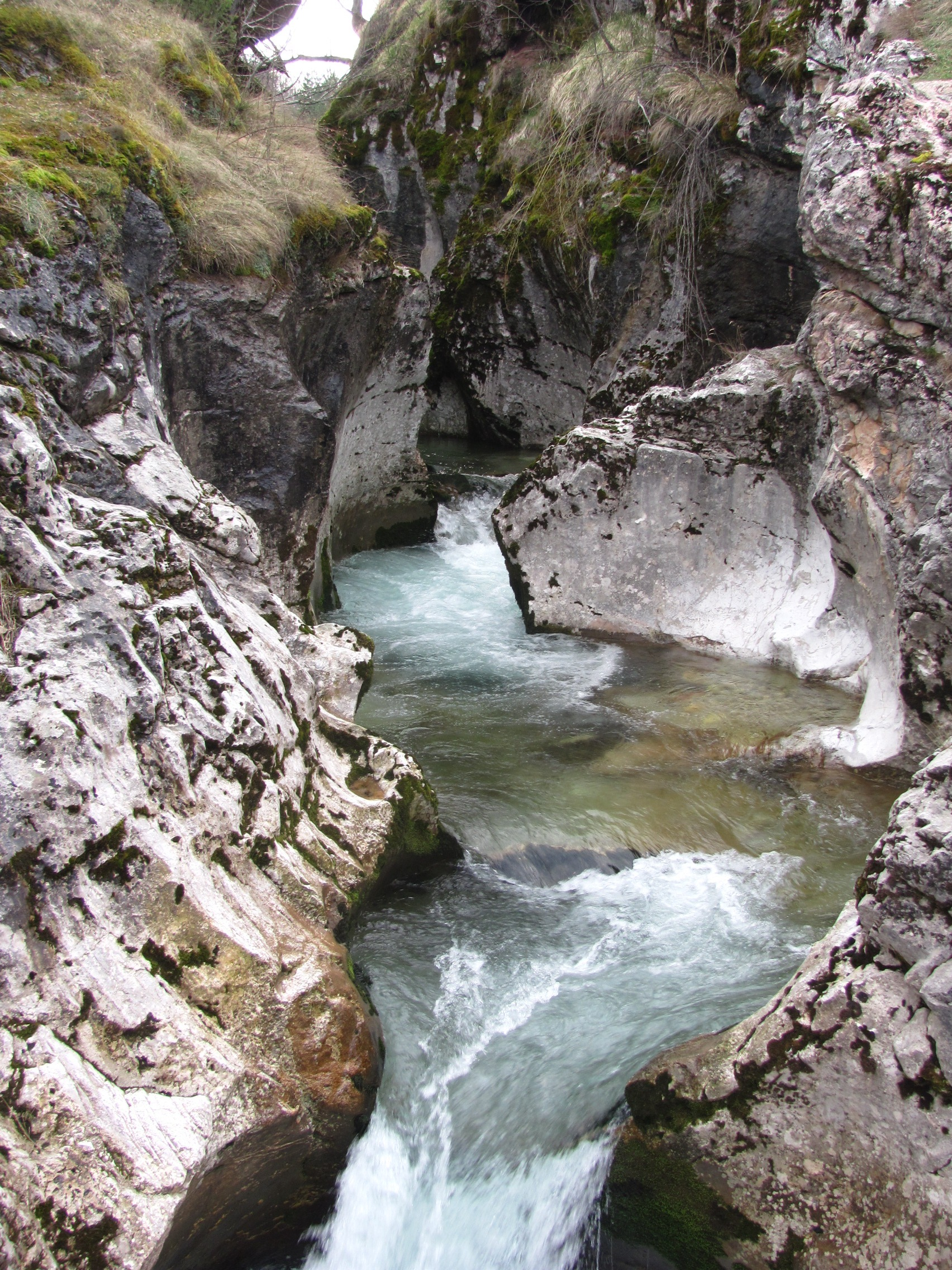 Српски (ћирилица): Казани на ријеци Жељезници This image was uploaded as part of Trace of Soul 2016.